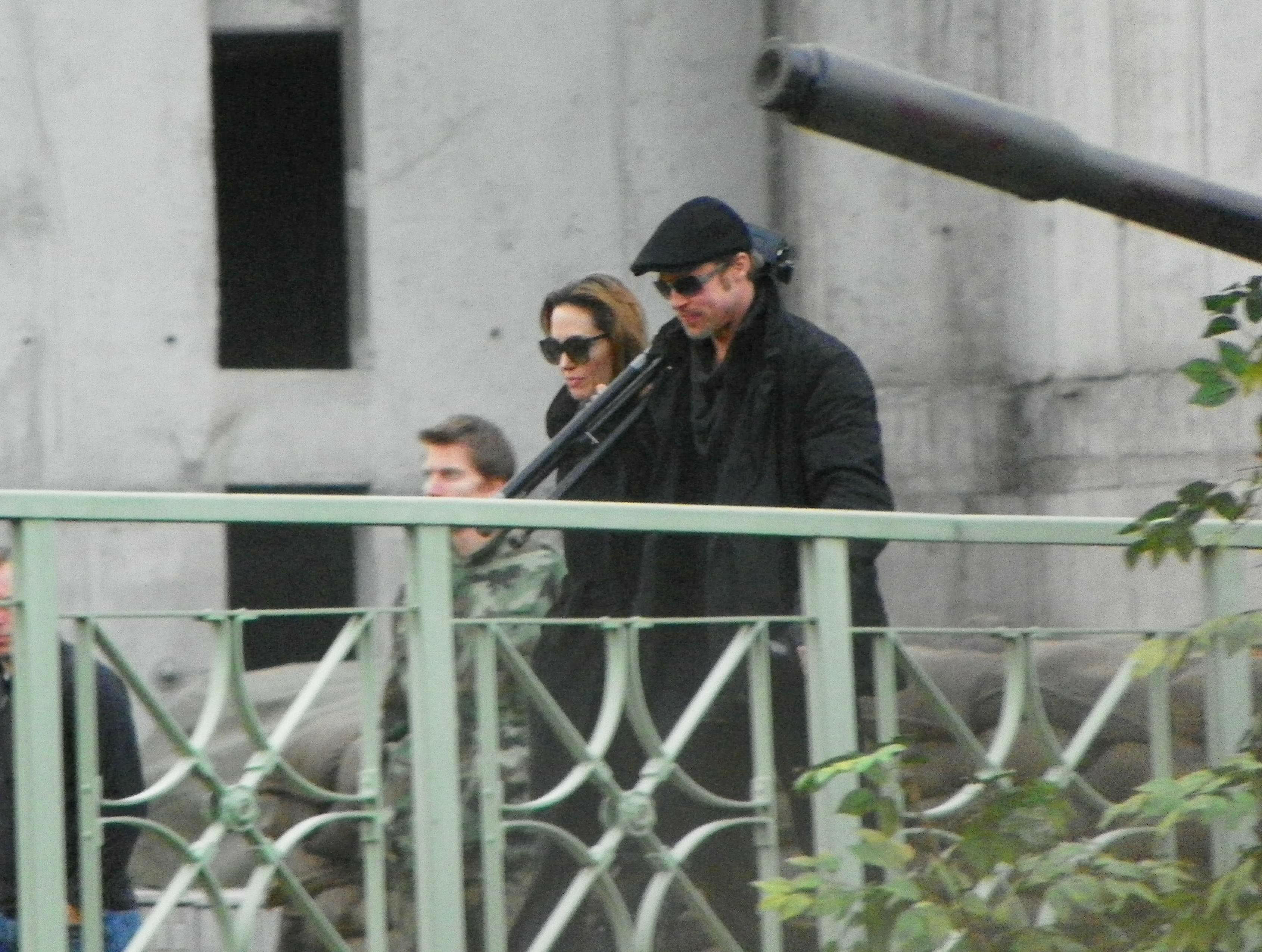 Angelina Jolie és Brad Pitt Esztergomban, a Bottyán hídon